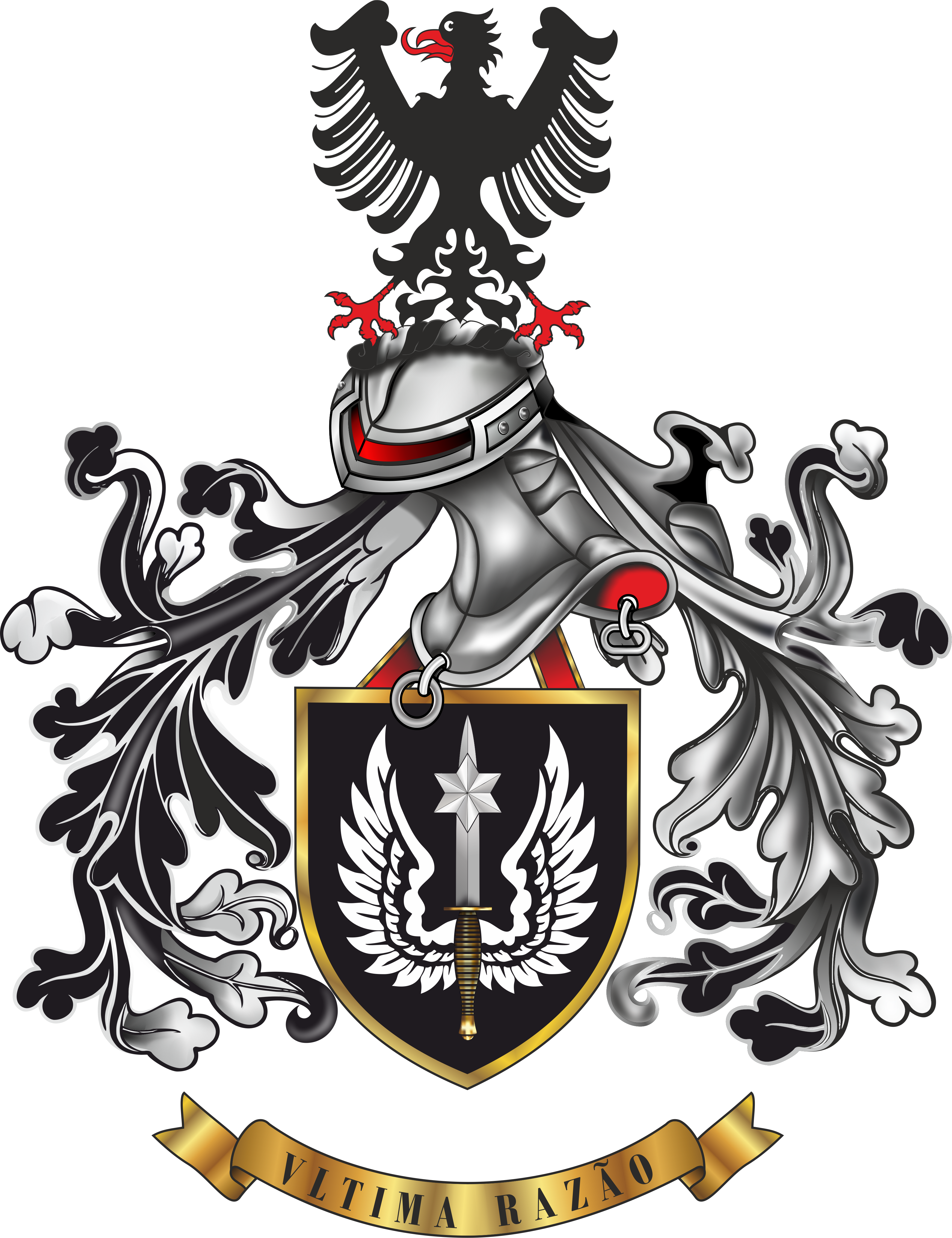 Brasão de Armas do Grupo de Operações Especiais da PSP